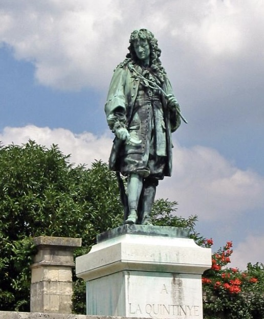 Statue de La Quintinie au Potager du Roi (Versailles) Source Photo JH Mora juillet 2004